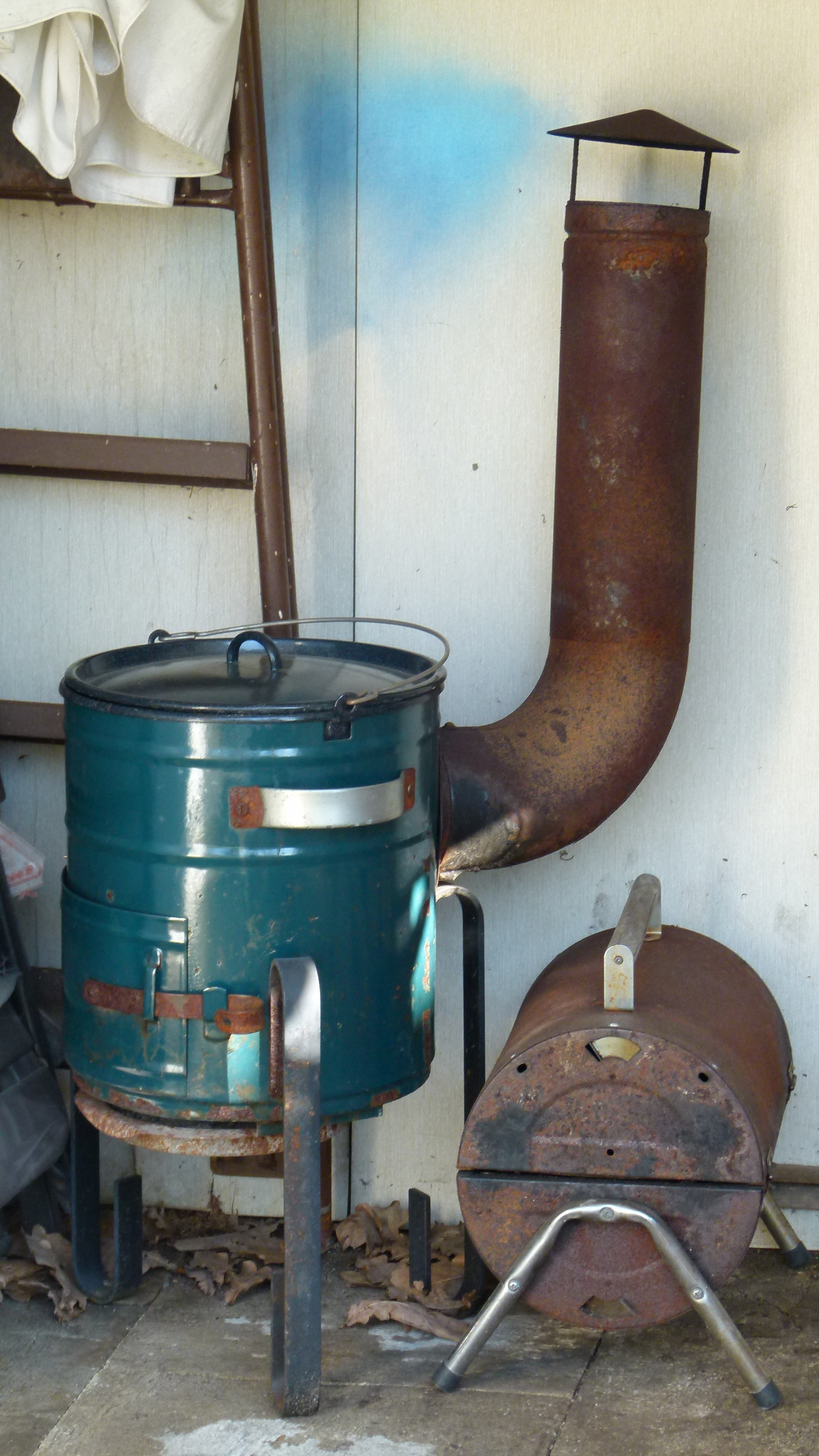 Kleiner Feldhochherd, Pillnitz, Dresden